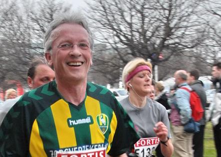 Tweedekamerlid Pierre Heijnen tijdens een marathon in een shirt van ADO Den Haag.